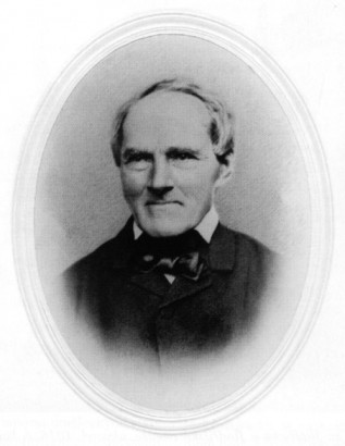 Malíř Vincenc Morstadt (1802-1875)